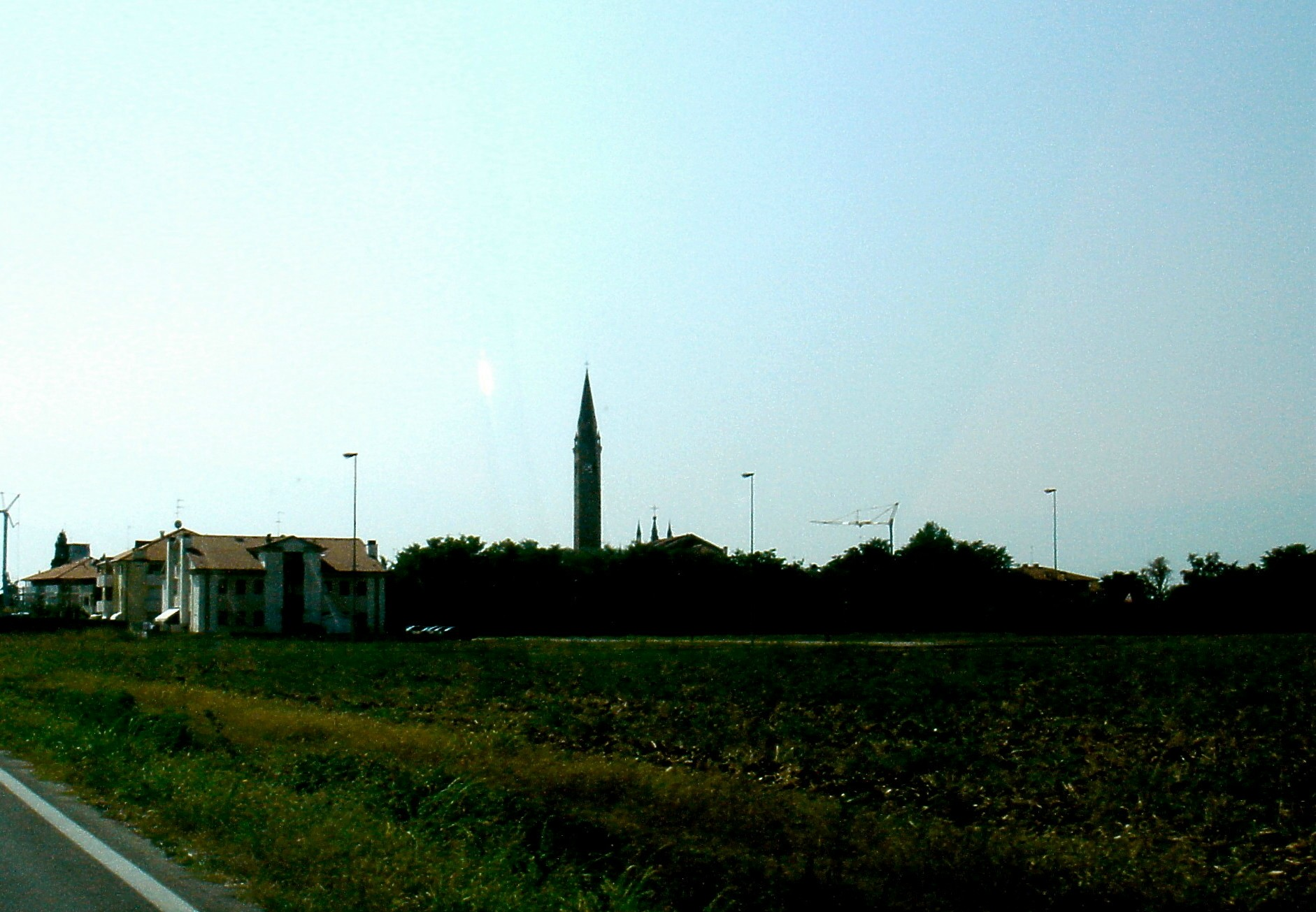 Santa Lucia di Piave (Treviso): verso il centro, dalla strada che collega il capoluogo comunale alla frazione Sarano.